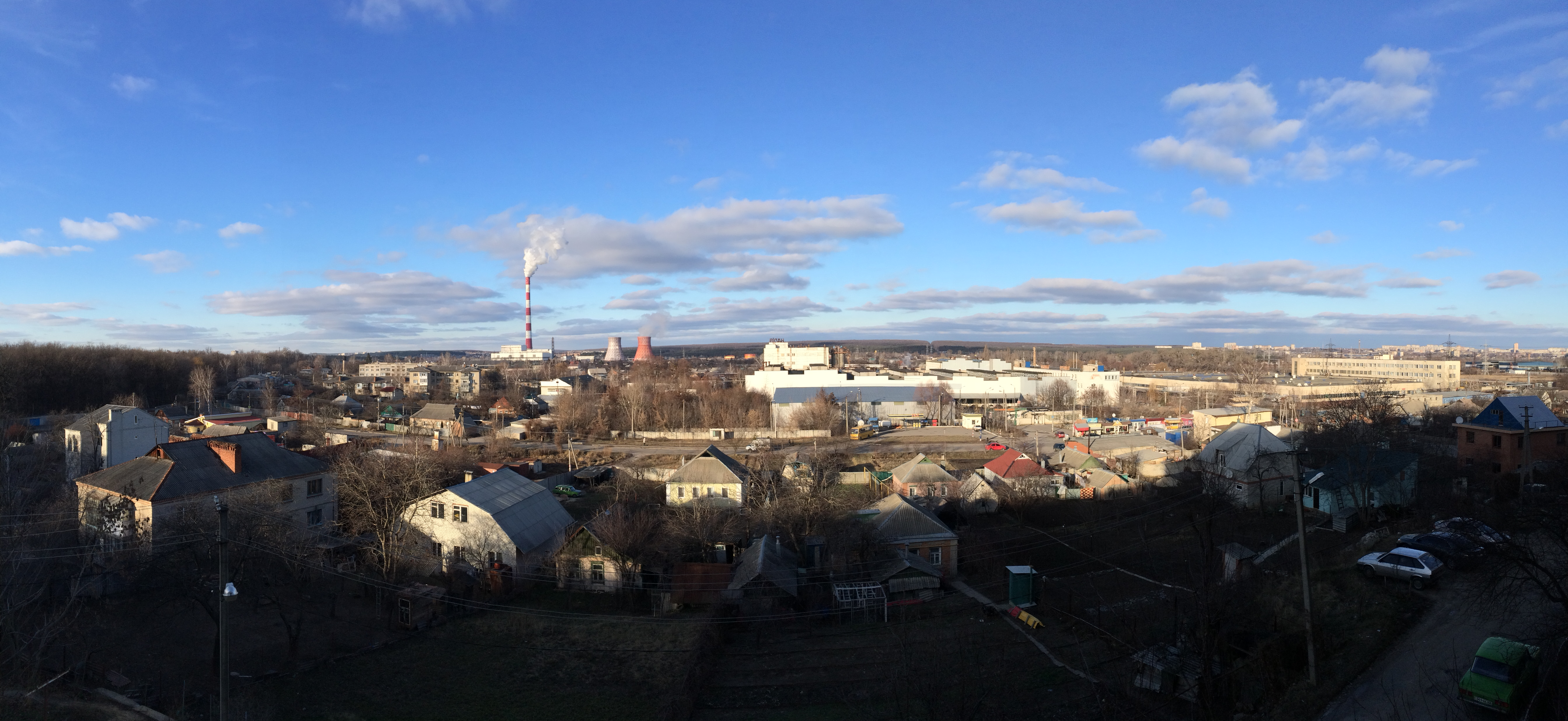 Панорама посёлка Песочин. Вид с Савиной горы.